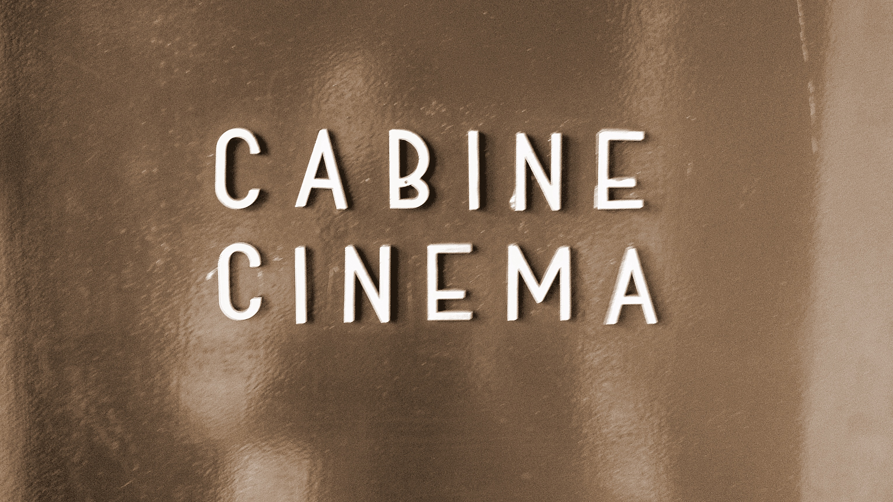 Porte métallique menant à la cabine de projection d'un cinéma (années quarante?), rue de Chantepoulet, Genève, Suisse